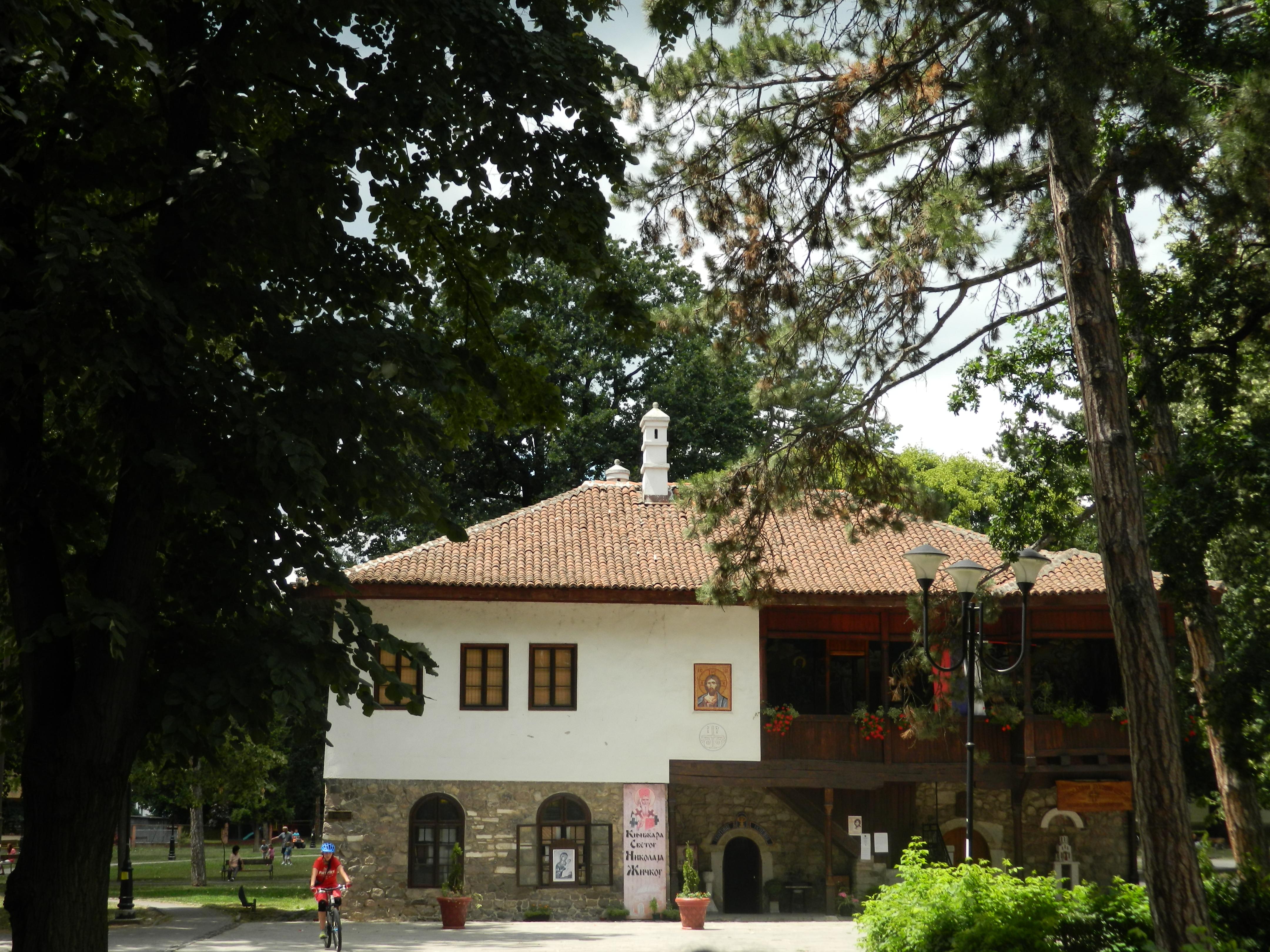 Gradski park u Kraljevu